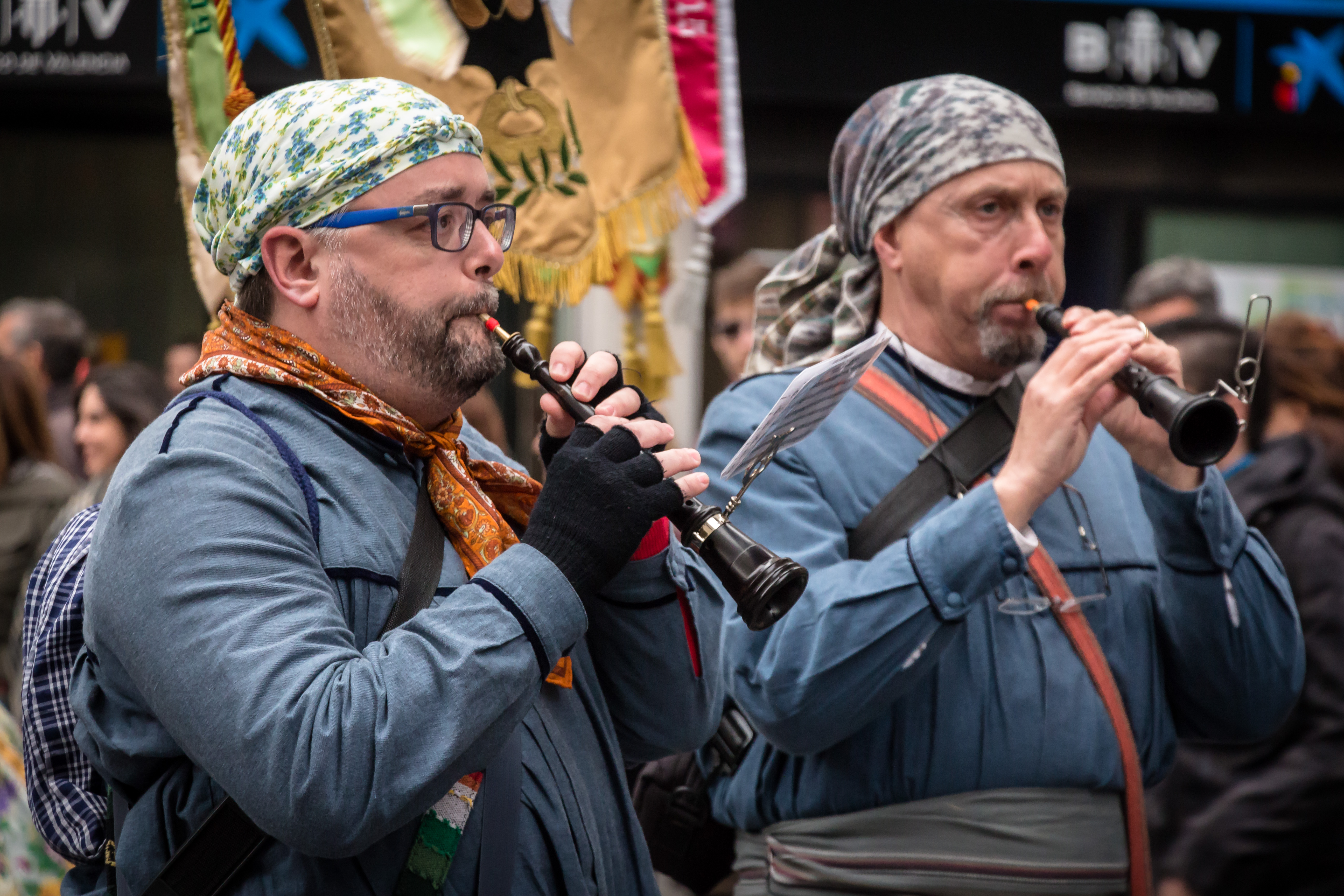 Como en tantas fiestas, la música también es una parte integral de las Fallas. En los últimos años ha cobrado especial importancia la recuperación de instrumentos tradicionales, como estas "dolçaines" que acompañan a una comisión fallera en la Ofrenda. This is a photography of a Folklore festival in Spain (Wikidata id Q1143768).